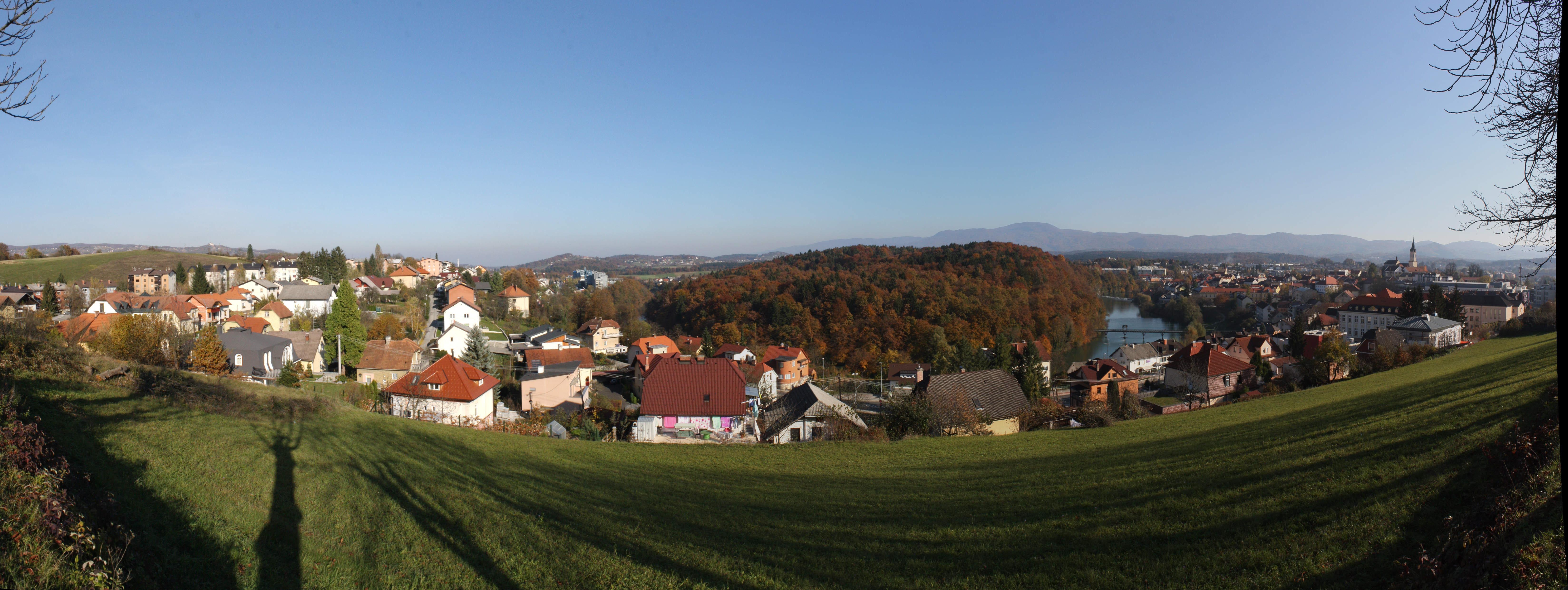 Novo mesto, Slovenija; panoramic photo from Marof